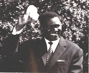 портрет Ахмеда Секу Туре